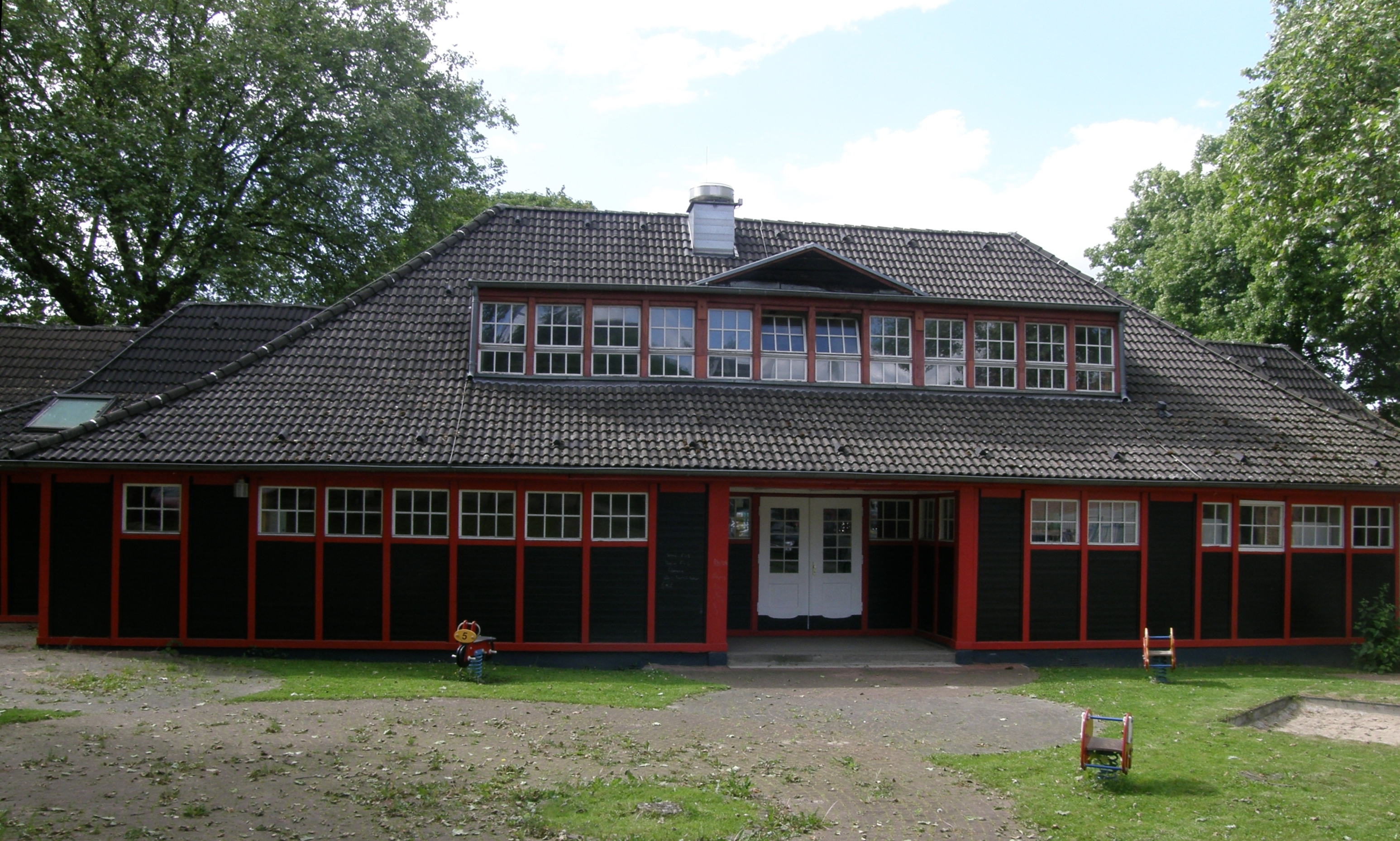 Jugendhalle Schonnebeck, ehemals Musterhalle für die Werkbundausstellung 1914, heute Begegnungs- und Freizeitstätte, steht unter Denkmalschutz Rückseite (über den Zaun fotografiert;-)